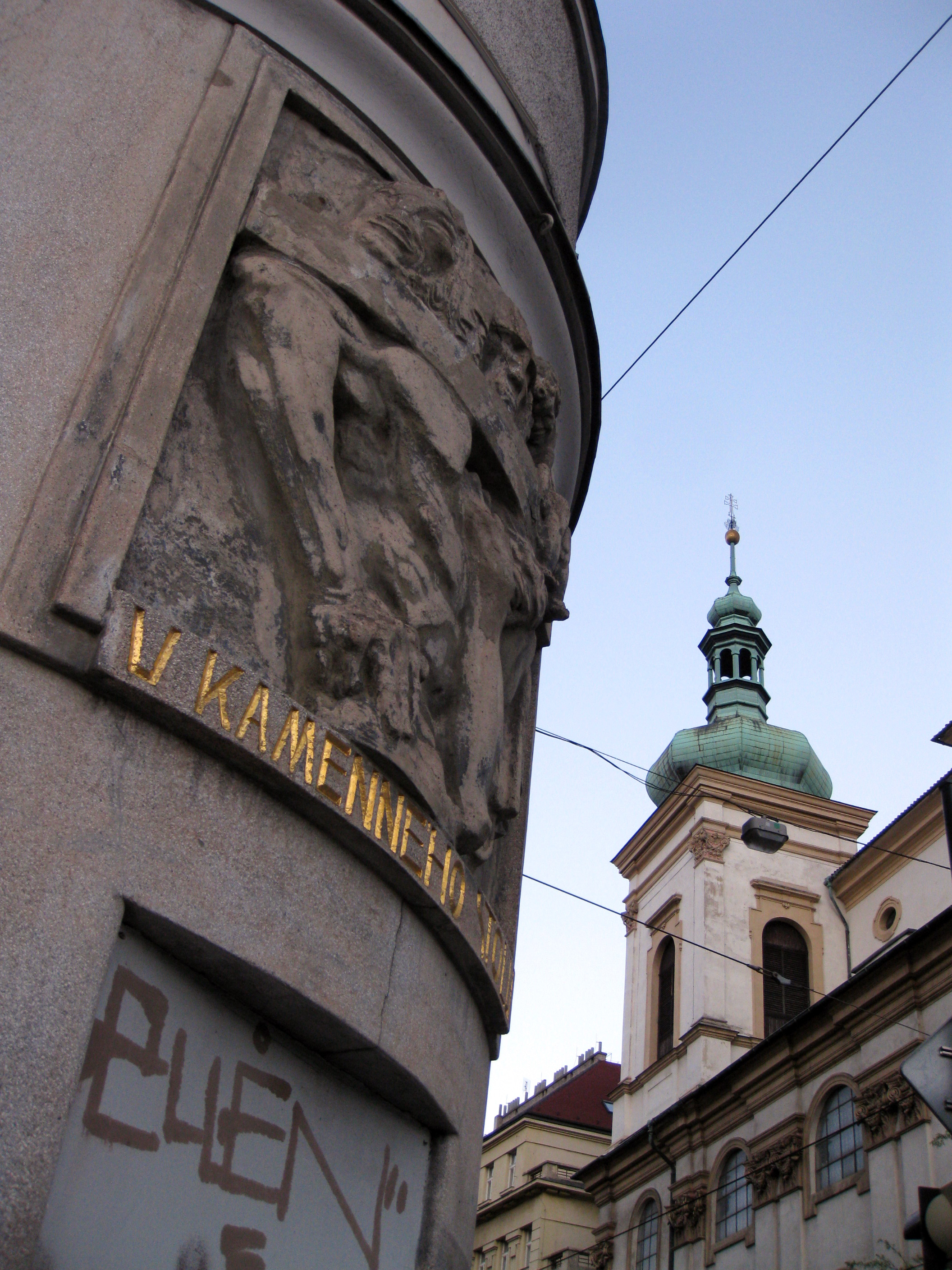 Měšťanský dům U kamenného stolu, Praha 2-Nové Město, Karlovo nám. 550/35, Ječná 550/1